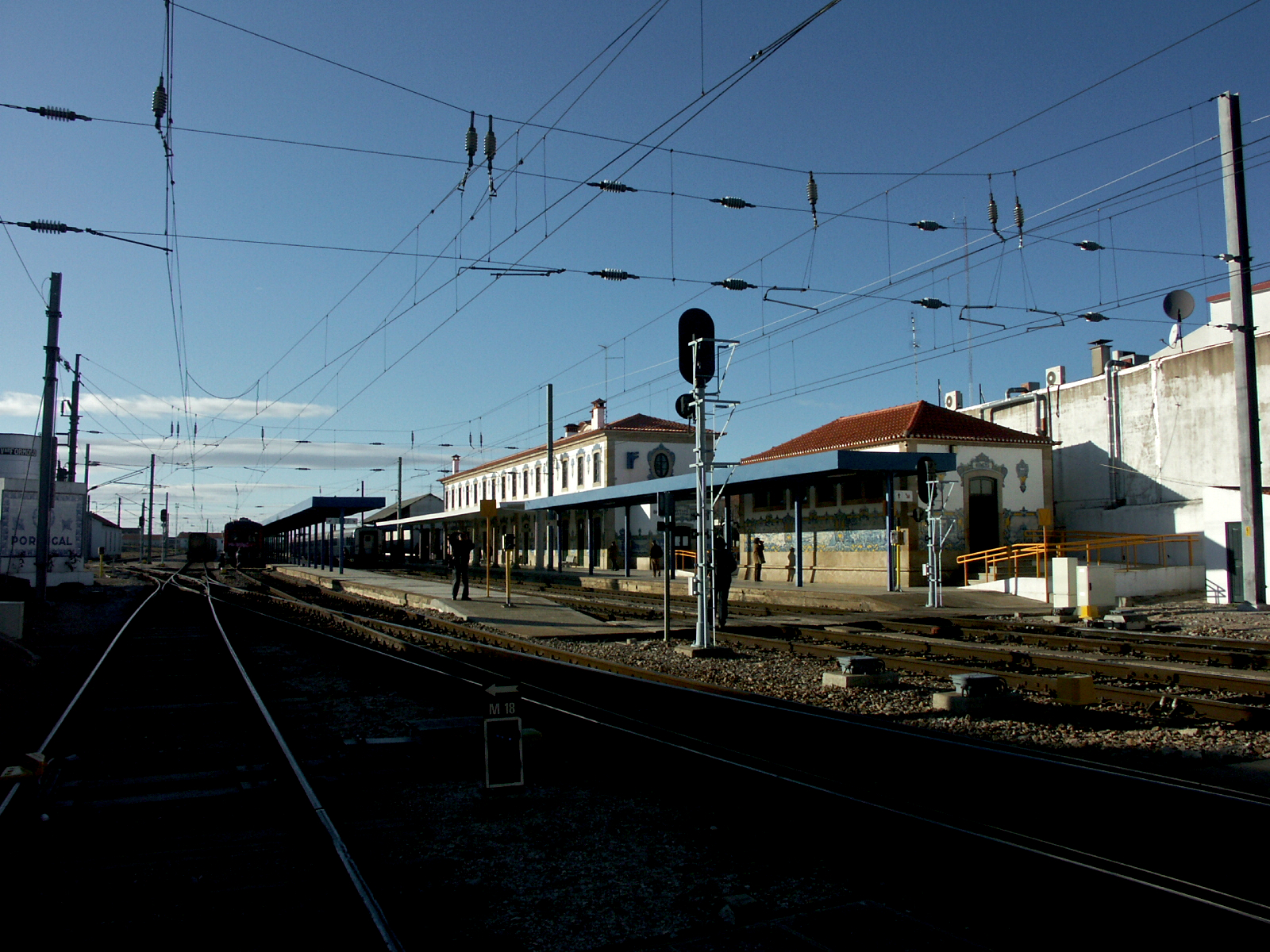 Tipo: EC [Estação de Concentração] Local: Vilar Formoso [Linha da Beira Alta, PK 252] Data e hora: 8 de Dezembro de 2007 [14h43]